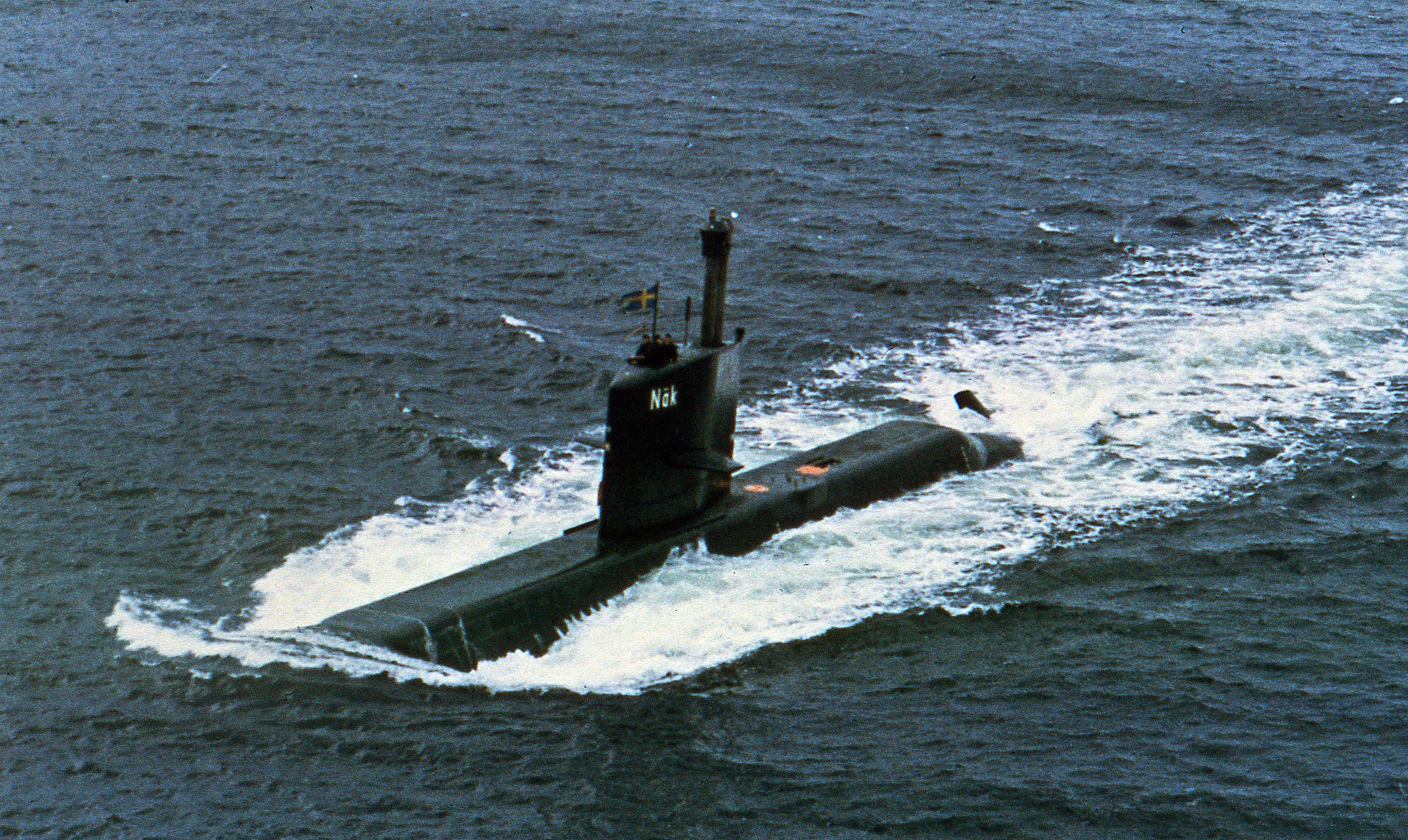 Den svenska ubåten HMS Näcken (Näk).